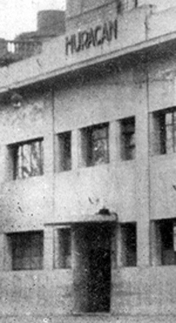 Antigua Sede de Club Atlético Huracán.